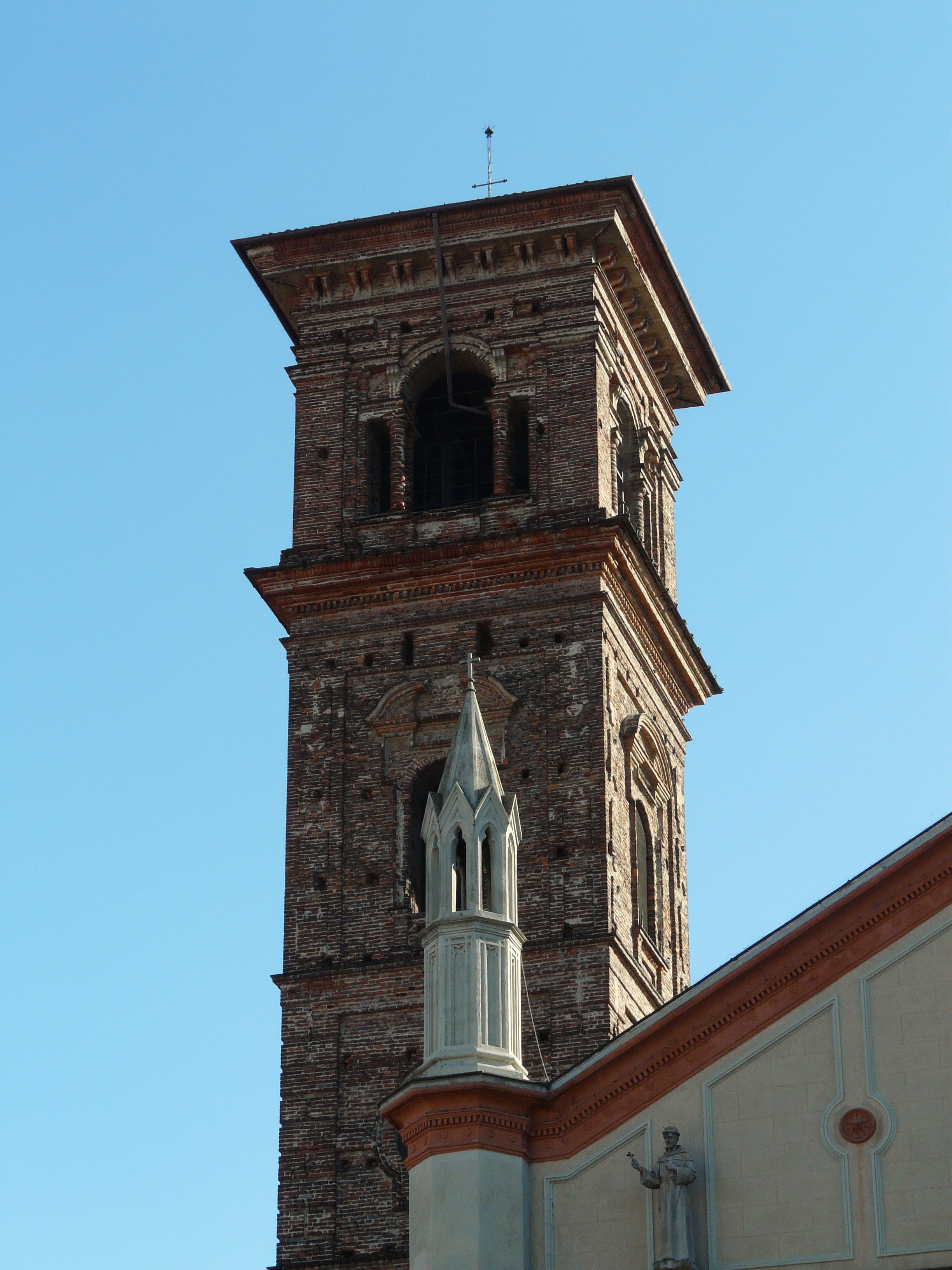 Campanile della collegiata dei Santi Pietro e Paolo, Carmagnola, Piemonte, Italia